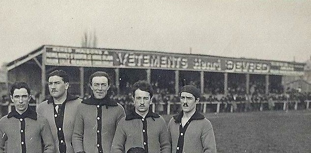 Trubune du stade Moulonguet prise le 25 février 1923, portant une publicité pour les vêtements Devred.